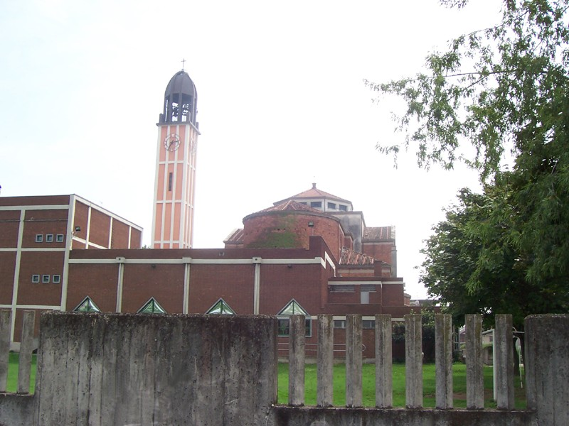 Bellinzago Lombardo - Chiesa Parrocchiale di S. Michele